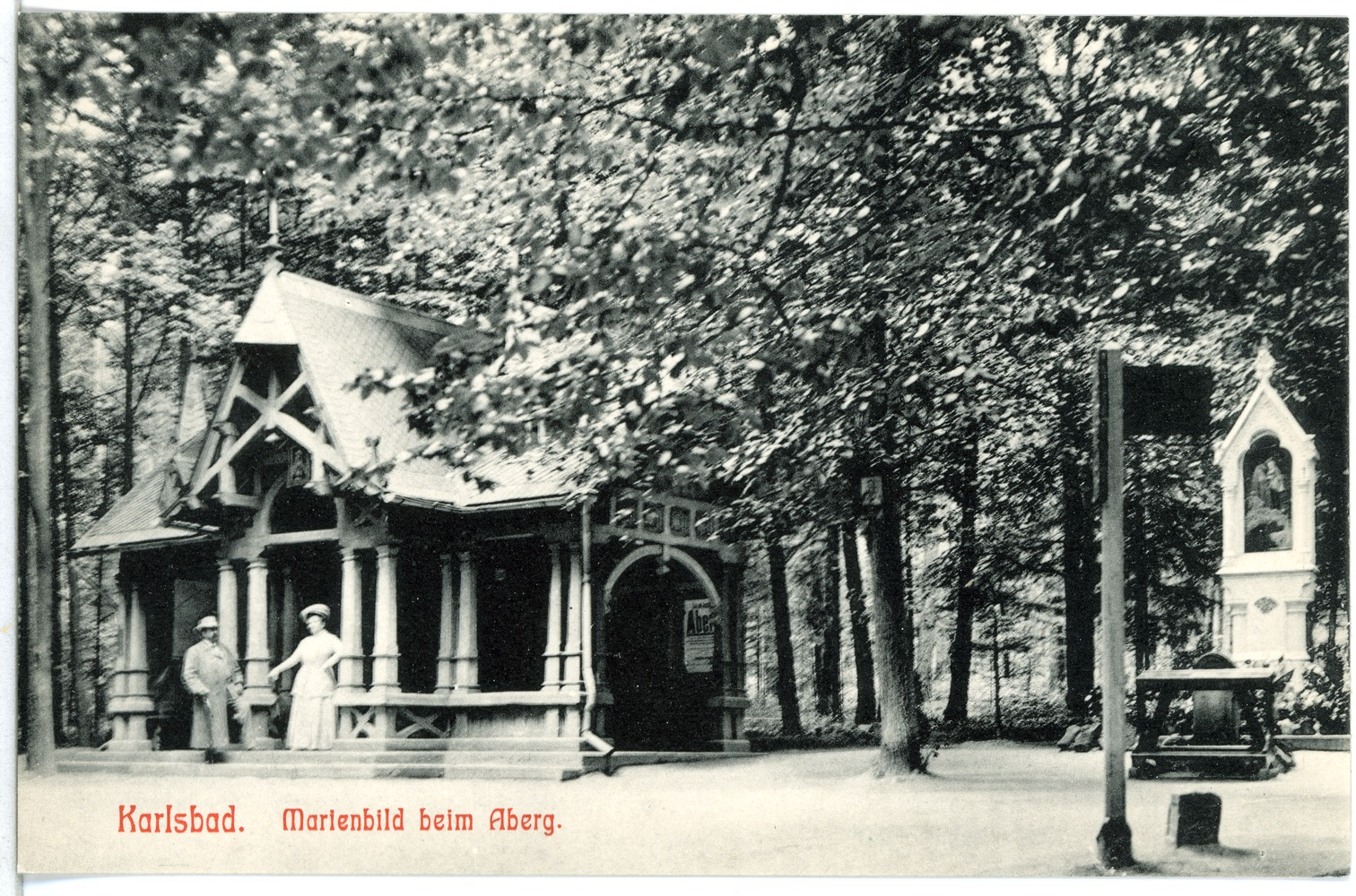 Karlsbad; Marienbild beim Aberg This postcard is from publisher Brück & Sohn in Meißen ( This postcard has a unique number 11627 and is available in a higher resolution at the publisher. This images was uploaded in a cooperation project between Wikipedians and the publisher.